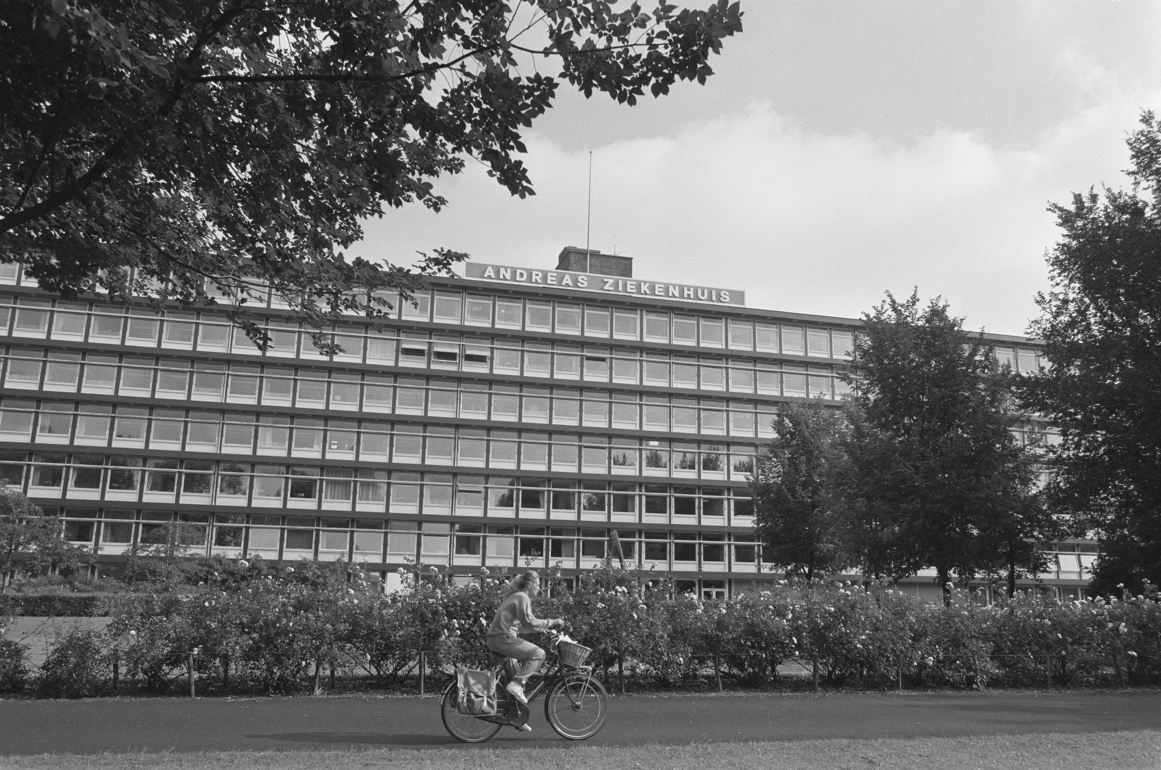 Collectie / Archief : Fotocollectie Anefo Reportage / Serie : [ onbekend ] Beschrijving : Exterieur Andreas Ziekenhuis in Amsterdam (i.v.m. dreigende sluiting) Datum : 28 juli 1988 Locatie : Amsterdam, Noord-Holland Trefwoorden : ziekenhuizen Persoonsnaam : Andreas Ziekenhuis Fotograaf : Bogaerts, Rob / Anefo Auteursrechthebbende : Nationaal Archief Materiaalsoort : Negatief (zwart/wit) Nummer archiefinventaris : bekijk toegang 2.24.01.05 Bestanddeelnummer : 934-2921